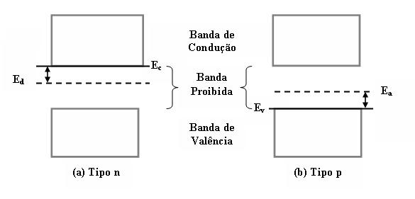 Bandas de Energia em semicondutores extrinsecos